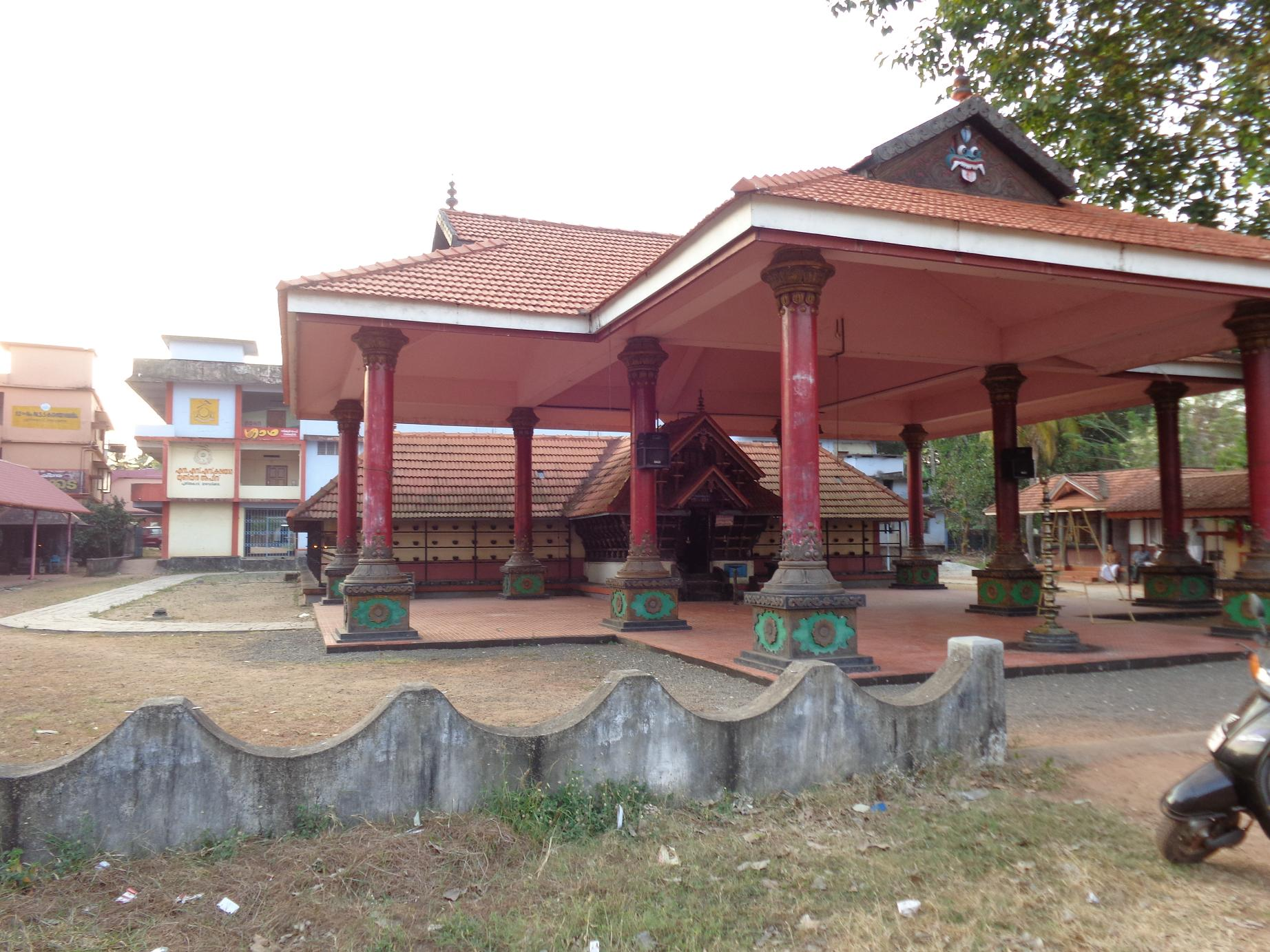 പുതിയകാവ് ദേവീക്ഷേത്രം, പുതിയകാവ് മാവേലിക്കര